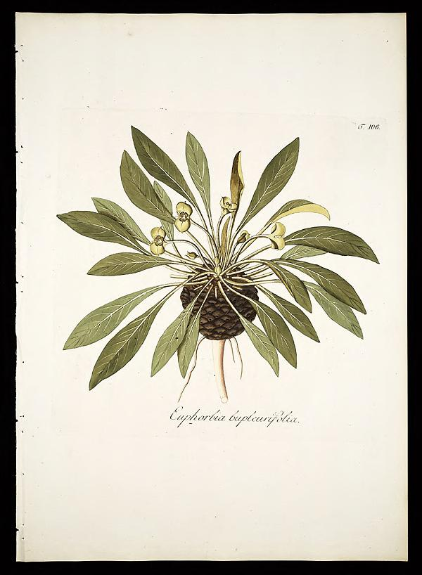 Plantarum rariorum horti caesarei Schoenbrunnensis descriptiones et icones /Opera et sumptibus Nicolai Josephi Jacquin.